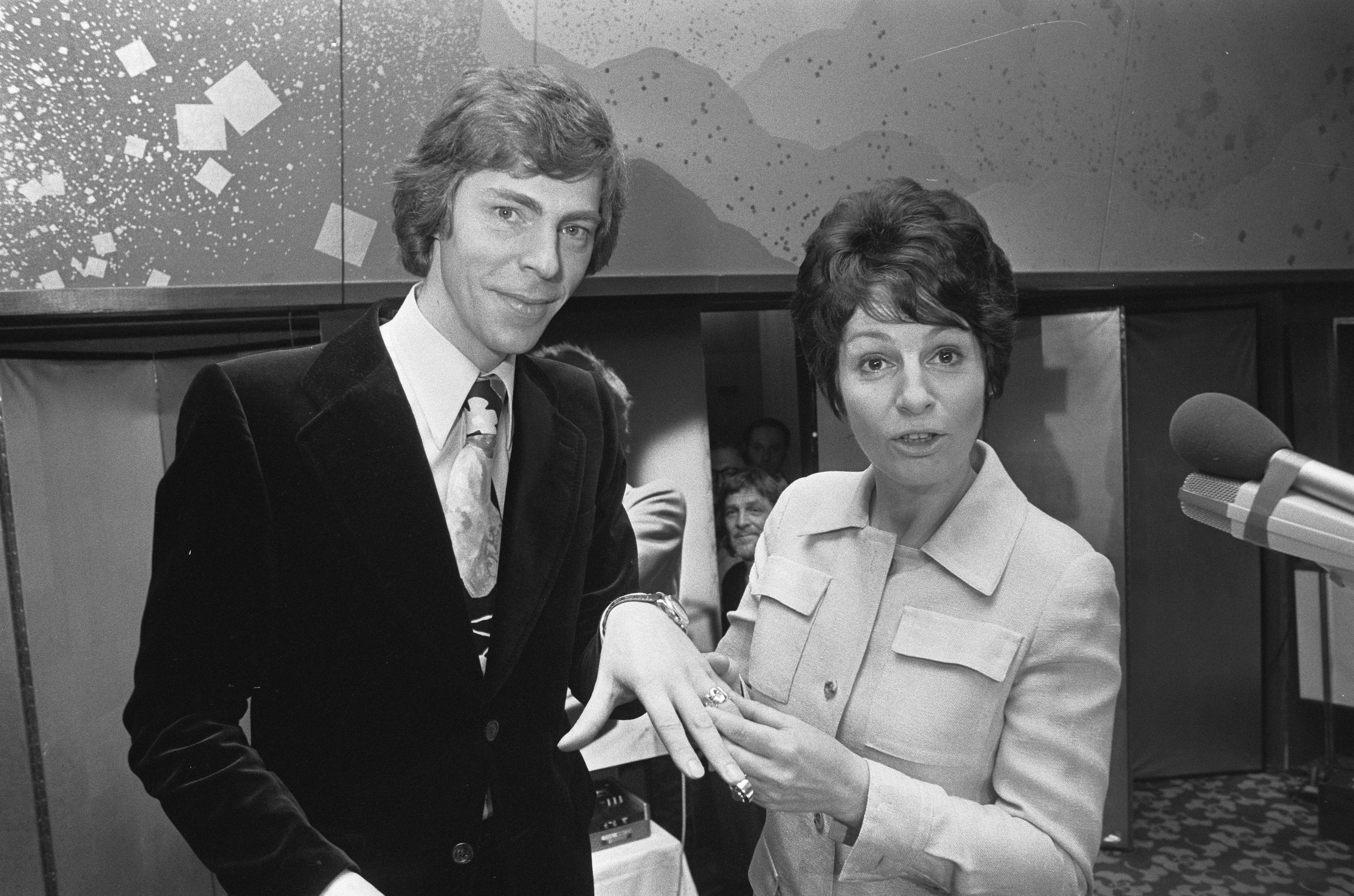 Collectie / Archief : Fotocollectie Anefo Reportage / Serie : [ onbekend ] Beschrijving : Berend Boudewijn krijgt Televizierring in Okurahotel te Amsterdam, Berend Boudewijn en Mies Bouwman Datum : 19 mei 1973 Locatie : Amsterdam, Noord-Holland Persoonsnaam : Boudewijn, Berend, Bouwman, Mies Instellingsnaam : Hotel Okura Amsterdam Fotograaf : Verhoeff, Bert / Anefo Auteursrechthebbende : Nationaal Archief Materiaalsoort : Negatief (zwart/wit) Nummer archiefinventaris : bekijk toegang 2.24.01.05 Bestanddeelnummer : 926-4218